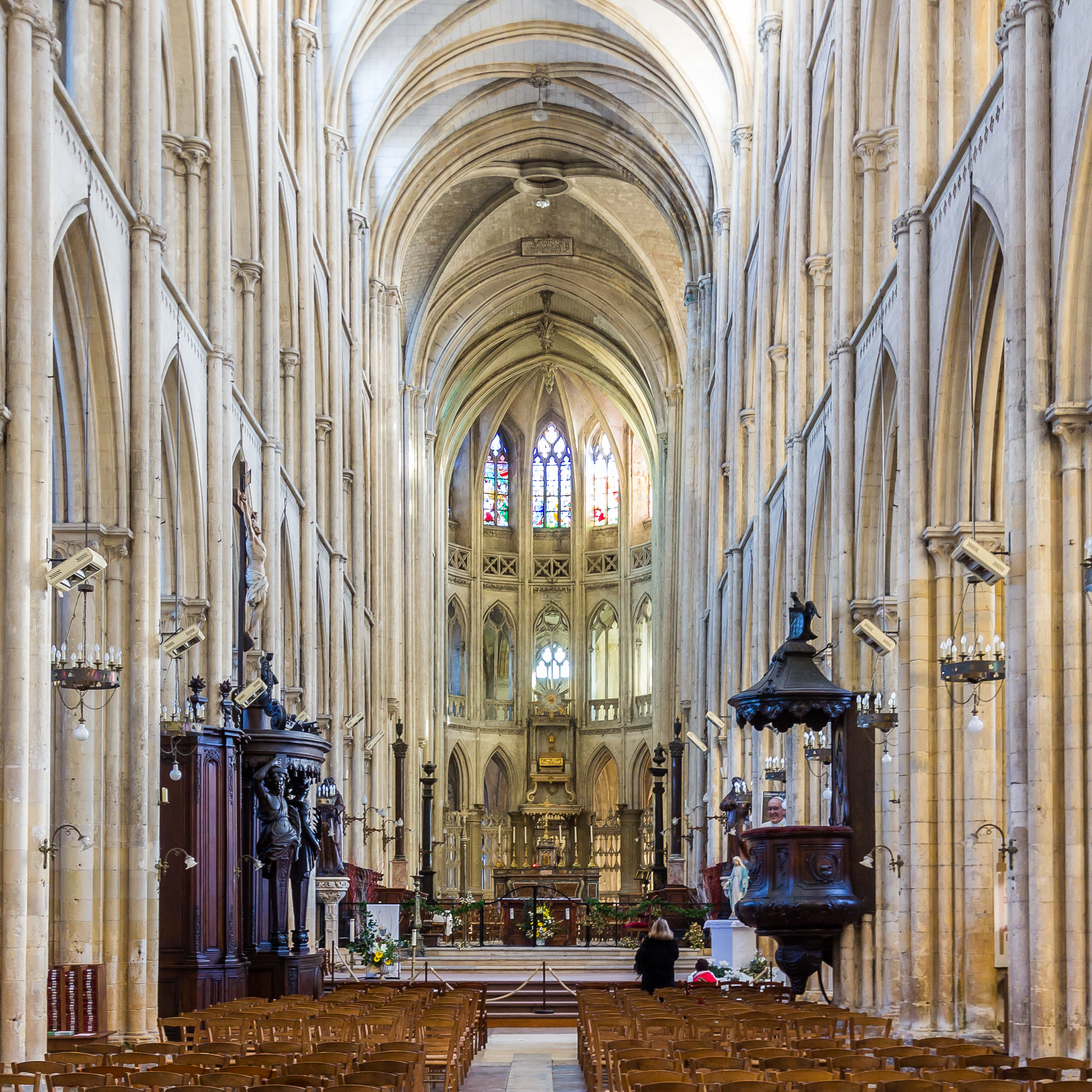 Collégiale Notre-Dame et Saint-Laurent d'Eu